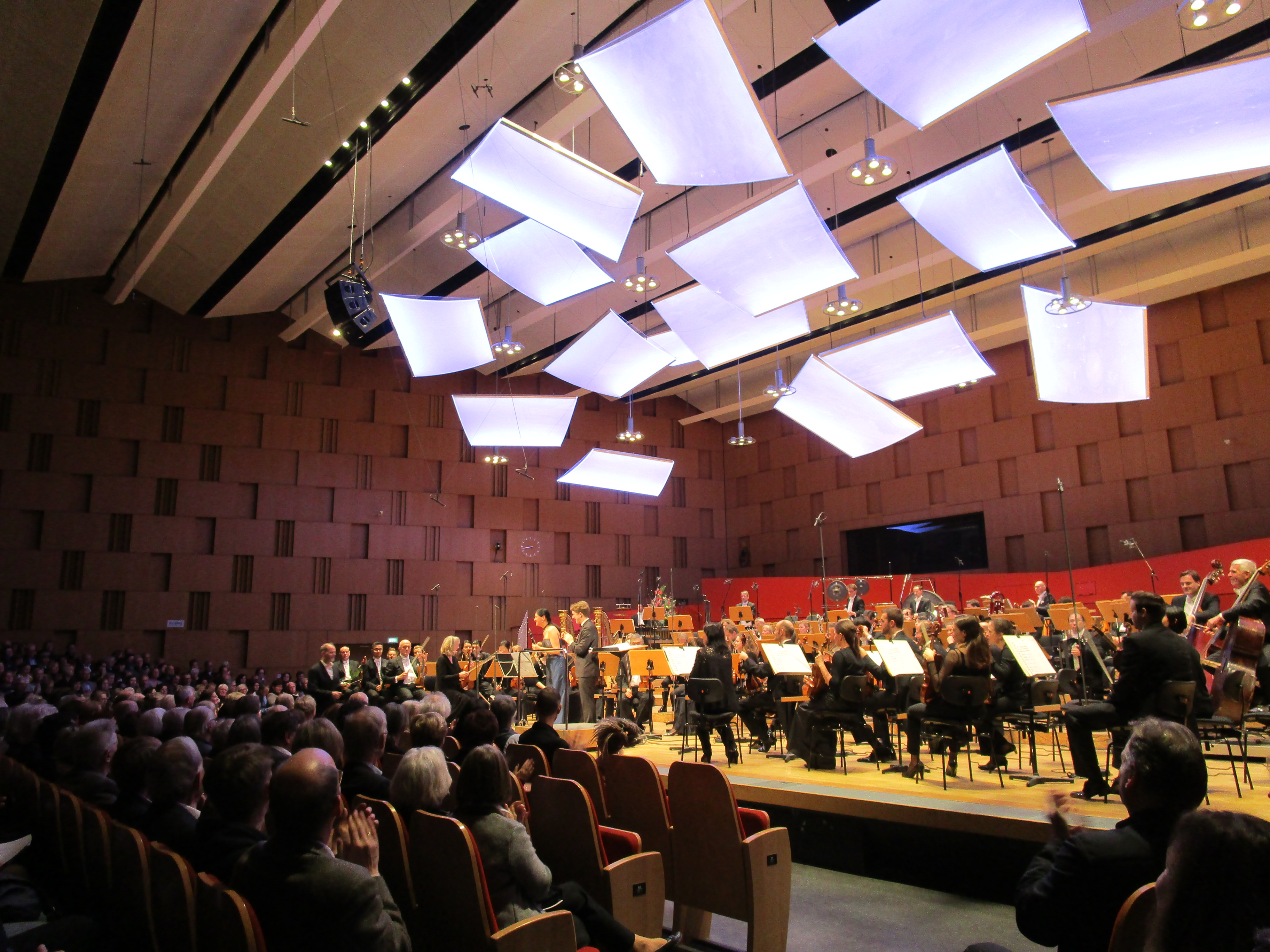 Das Konzert für Klarinette und Orchester (2018) von Thorsten Encke ist ein Auftragswerk des Norddeutschen Rundfunks. Die Uraufführung gestalteten die Klarinettistin Sharon Kam und die NDR Radiophilharmonie unter dem Dirigat von Joshua Weilerstein am 10. Januar 2019 im Großen Sendesaal des NDR-Funkhauses in Hannover. Am folgenden Tag, dem 11. Januar 2019, führten sie das Werk erneut auf.